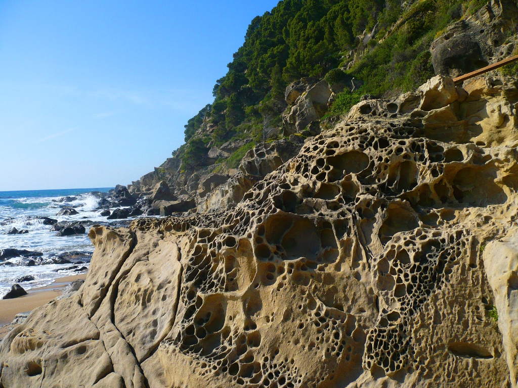 Scogli della Punta Pagliarola di Tresino a Castellabate, dove si nota il fenomeno dell'aloclastismo